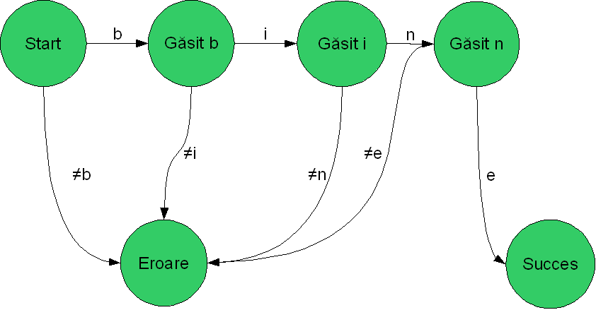 Realizat de Andrei Stroe folosind Draw 2.0